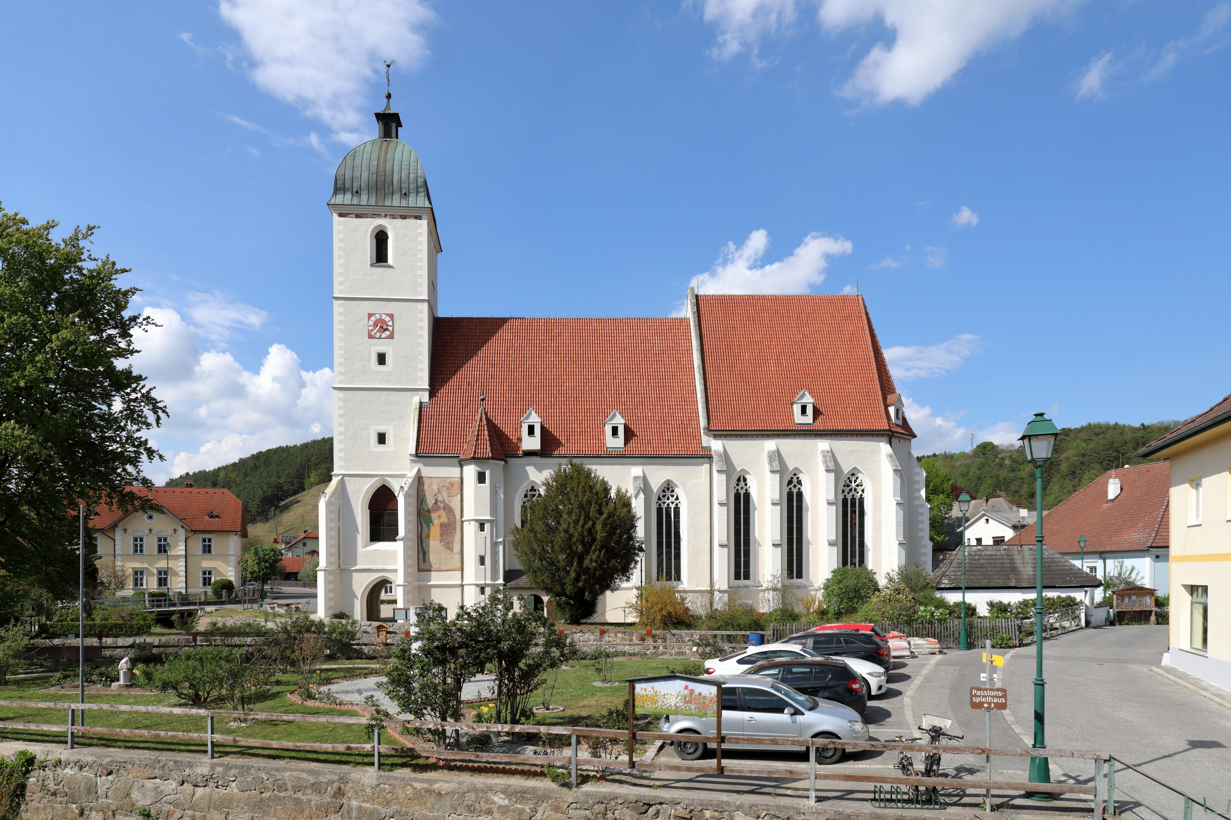 Südansicht der Pfarrkirche hl. Johannes der Täufer in der niederösterreichischen Stadt Kirchschlag in der Buckligen Welt.Nach einem Brand 1459 wurde die Kirche weitgehend in der heutigen Form in der zweiten Hälfte des 15. Jahrhunderts errichtet. Der vorgestellte Westturm wurde im ersten Drittel des 16. Jahrhunderts erbaut. 1797 trug man die baufällige spätgotische Turmspitze ab und ersetzte sie durch eine barocke Blechhaube. Südseitig im ersten Joch des Langhauses befindet sich ein monumentales Wandgemälde des hl. Christophorus, das um 1500 entstand.